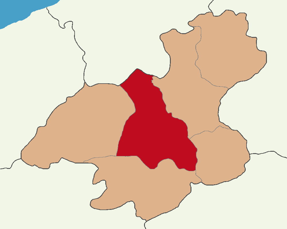 Karabük Merkez ilçesinin konumu